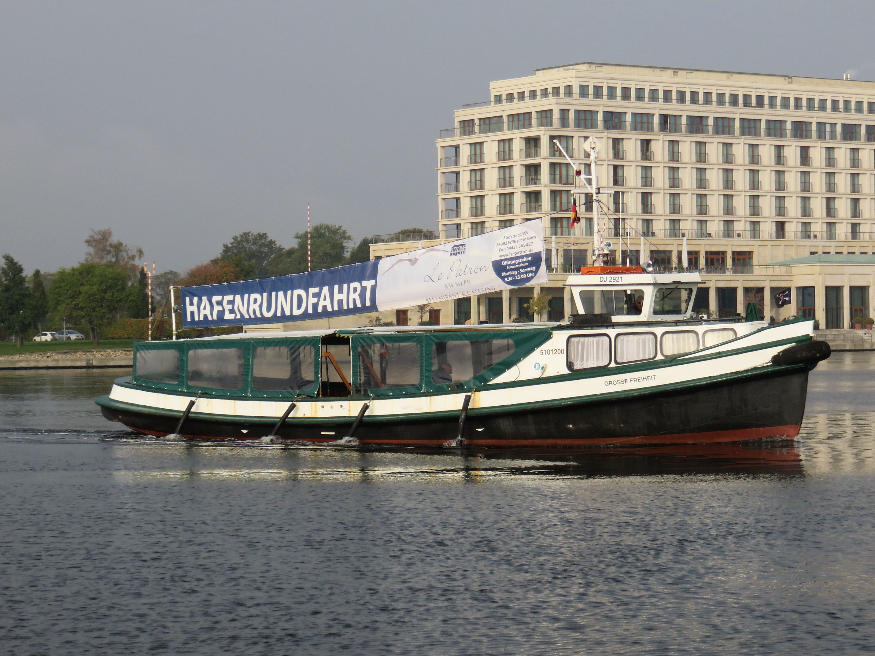 Hafenbarkasse Grosse Freiheit im Großen Hafen von Wilhelmshaven